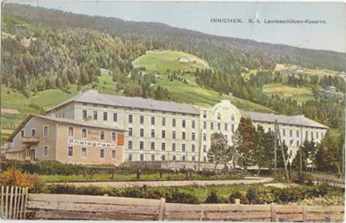 Landesschützenkaserne in Innichen